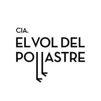 Logo de la companyia de teatre El Vol del Pollastre